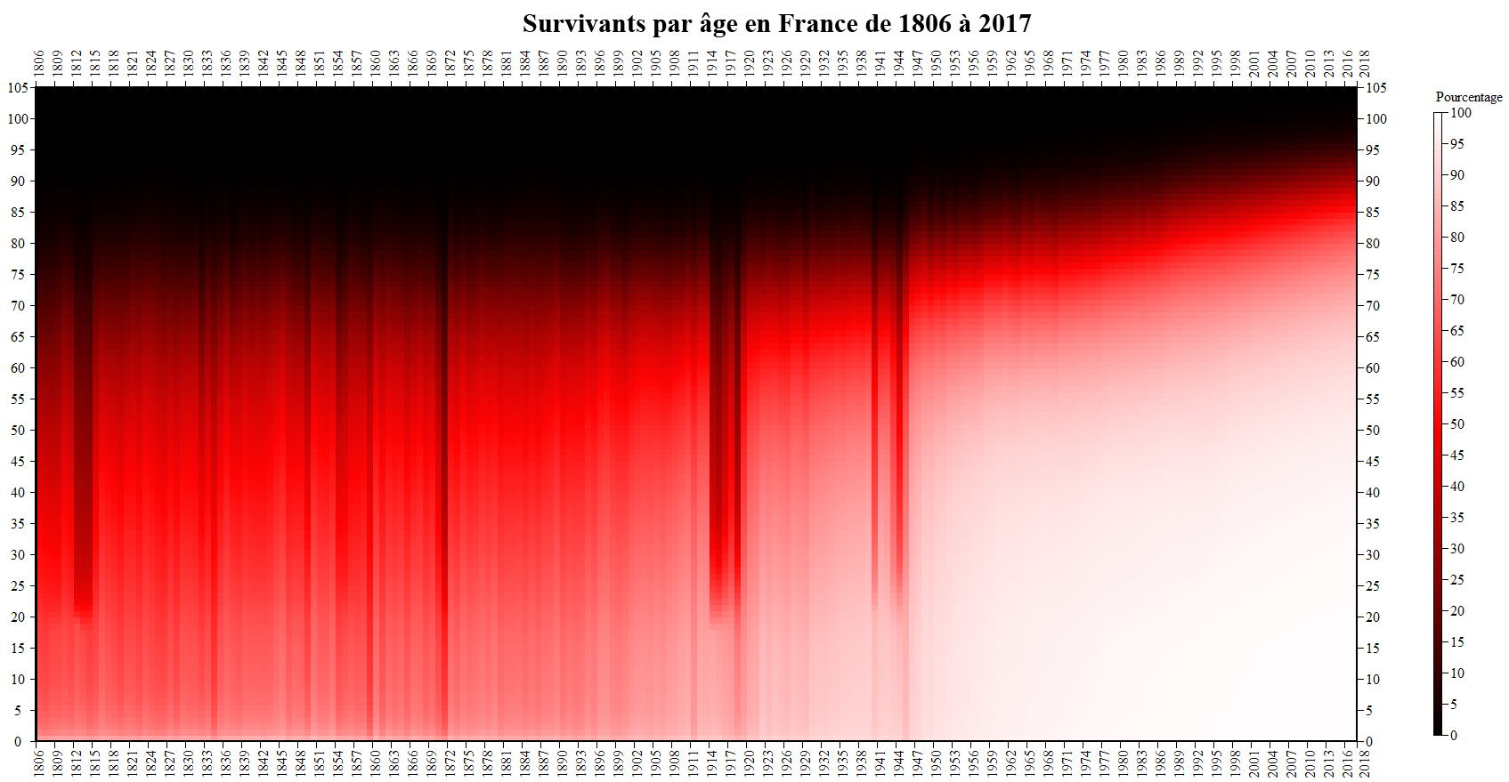 Évolution du pourcentage de survivance en France de 1806 à 2017 (Source: INED) Légende: Pourcentage du nombre de survivants d'une année en fonction de l'âge. Blanc = 100% de la population à survécu jusqu'à l'âge en abscisse pour l'année en ordonnée. Rouge = 50% de la population à survécu jusqu'à l'âge en abscisse pour l'année en ordonnée. Noir = 0% de la population à survécu jusqu'à l'âge en abscisse pour l'année en ordonnée.